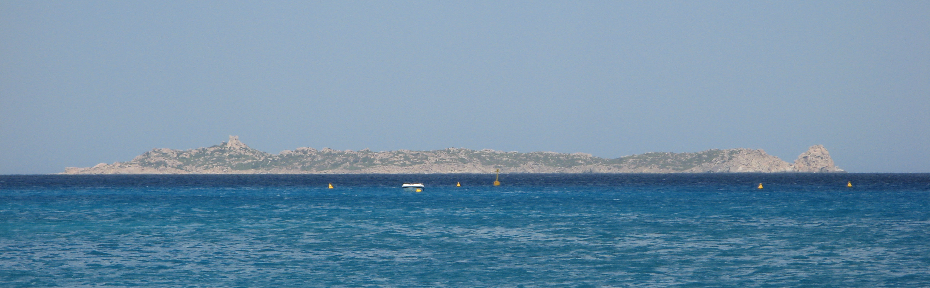 Isola Serpentara (Cagliari)